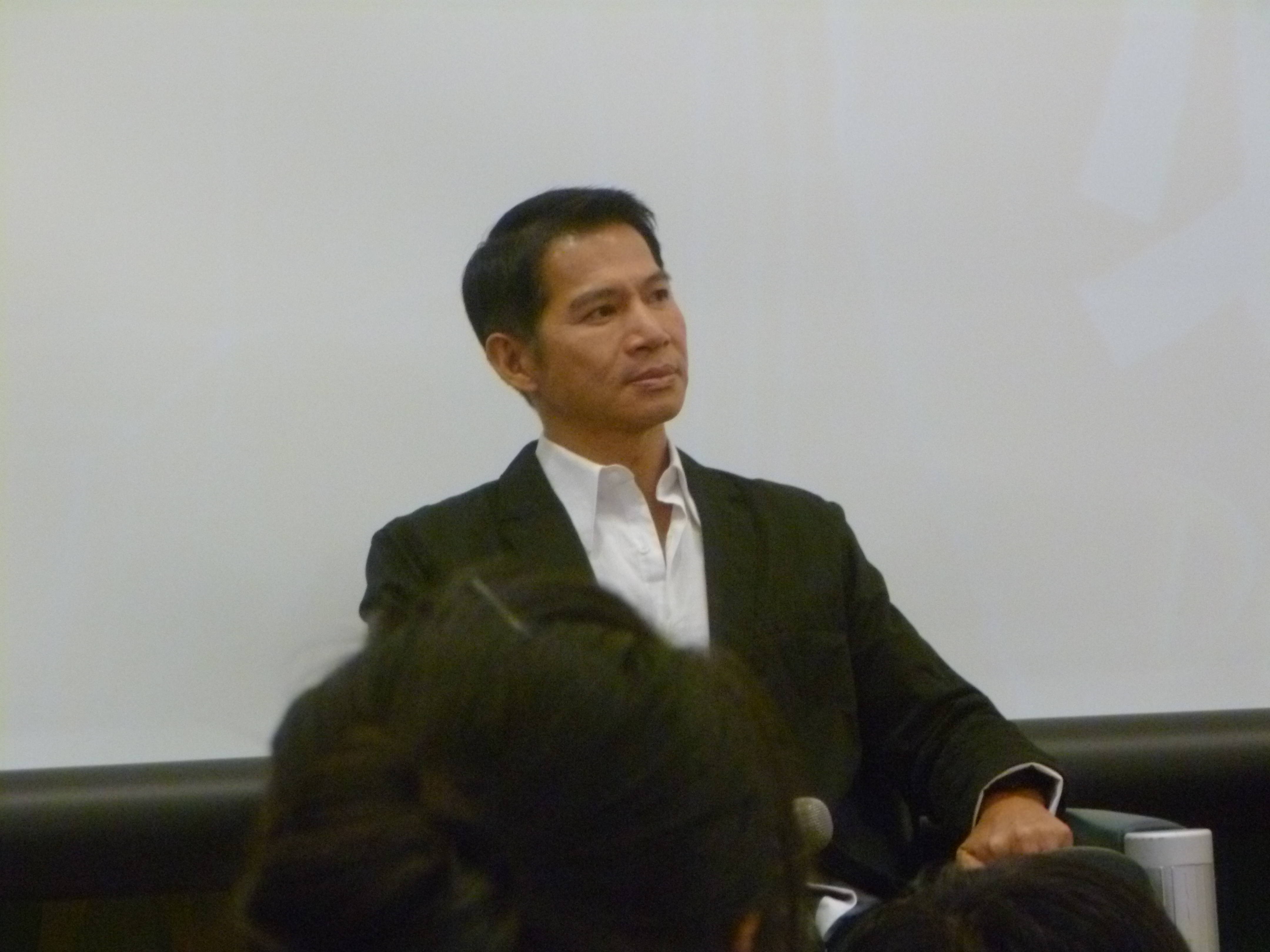 Jackson Lau Hok-Yin 中文（台灣）: 樓學賢在《BBS鄉民的正義前傳：必要之闇》的台中首映會